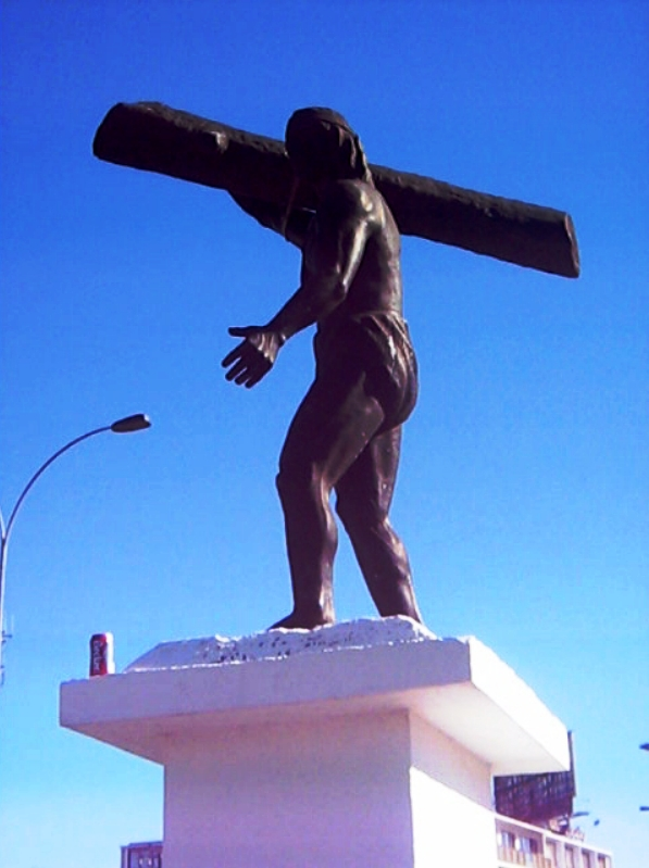 Monumento al toqui Caupolicán, en la ciudad de Temuco, Chile.